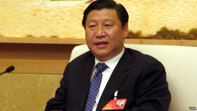 习近平